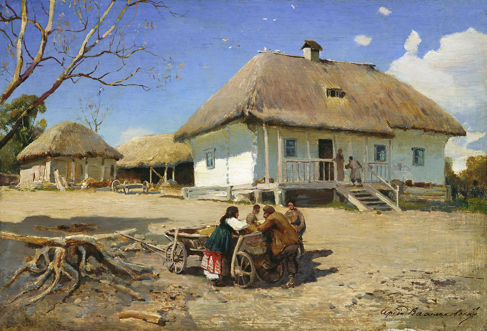 "Козацький двір" Cossack house